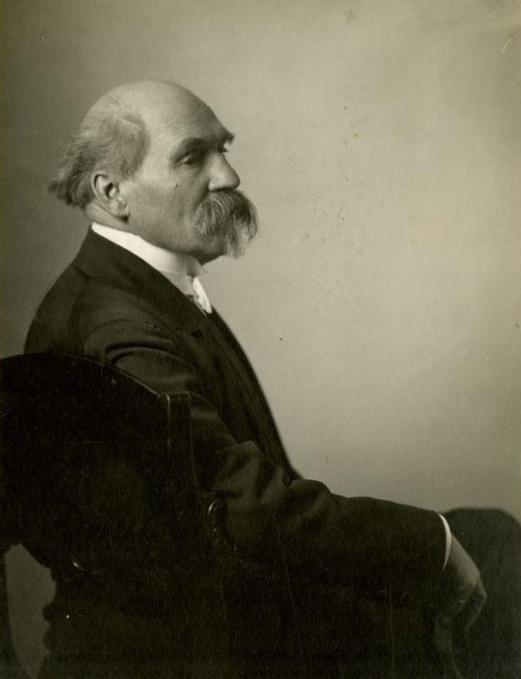 Архангельский, Александр Андреевич